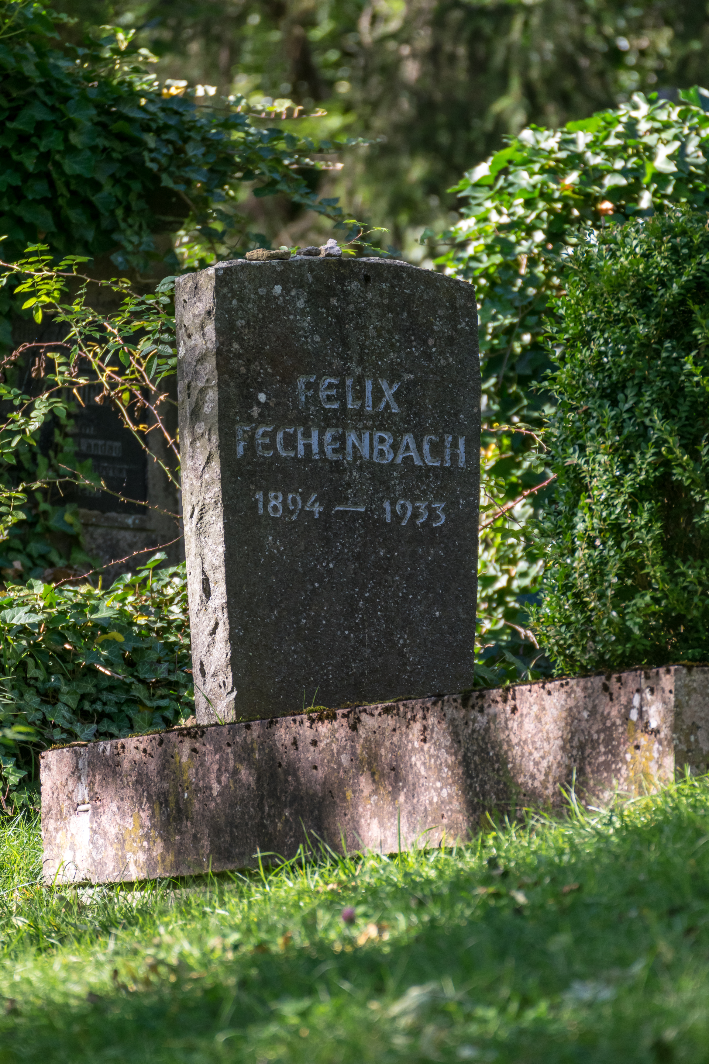 Grab Felix Fechenbachs auf dem jüdischen Friedhof Warburg-Rimbeck